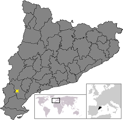 Localització de Móra d'Ebre. Location of Móra d'Ebre in Catalonia.